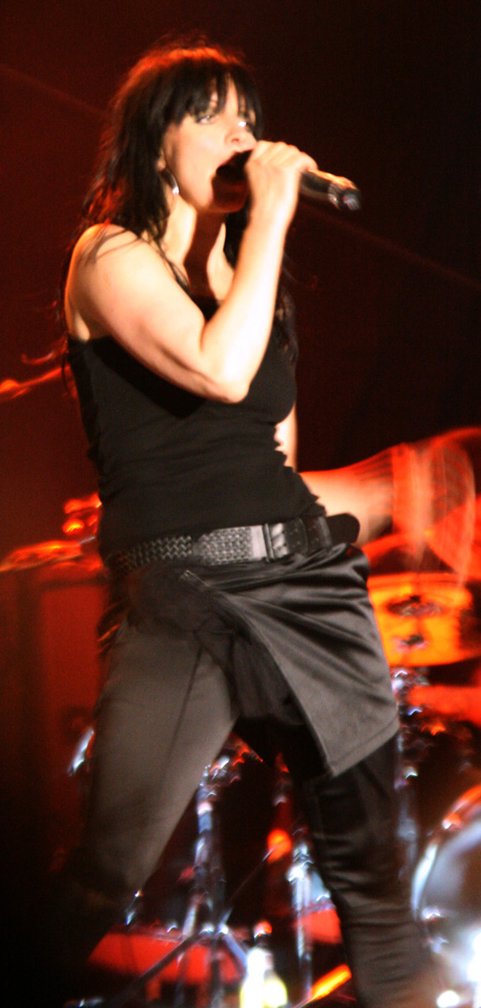 Nena